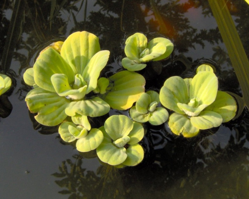 Ausschnitt aus Image:Pistia stratiotes 1.jpg von User:Kristjan Beschreibung: Pistia stratiotes (Herbst, Gartenteich) Fotograf: User:Kristjan